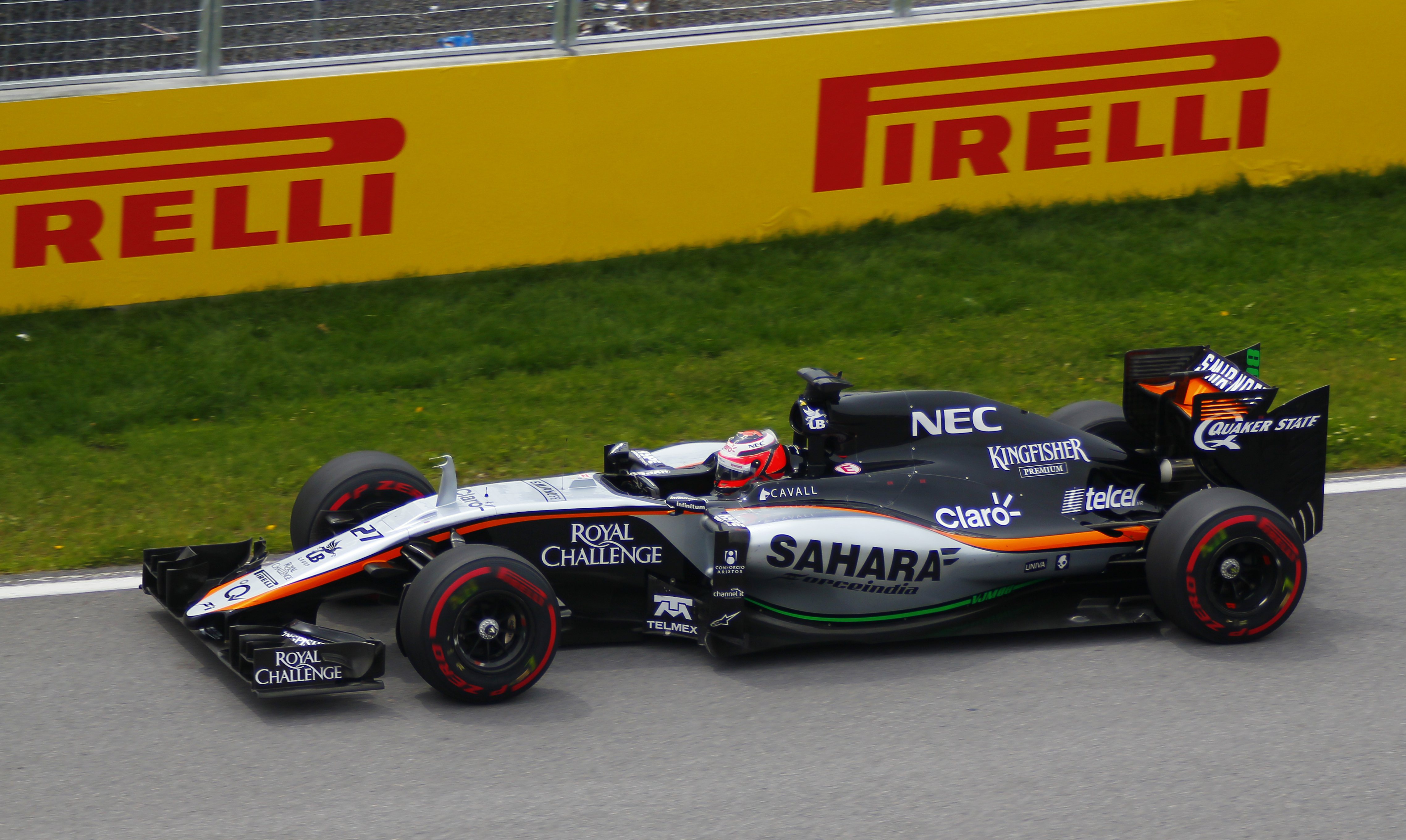 Nico Hulkenberg - Force India - Grand Prix du Canada - Circuit Gilles-Villeneuve - 7 juin 2015 (Photo Paul-Émile Poulin-Jacques)